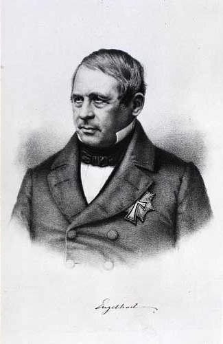 Niels Engelhart (1777-1863), Norwegian and Danish judge